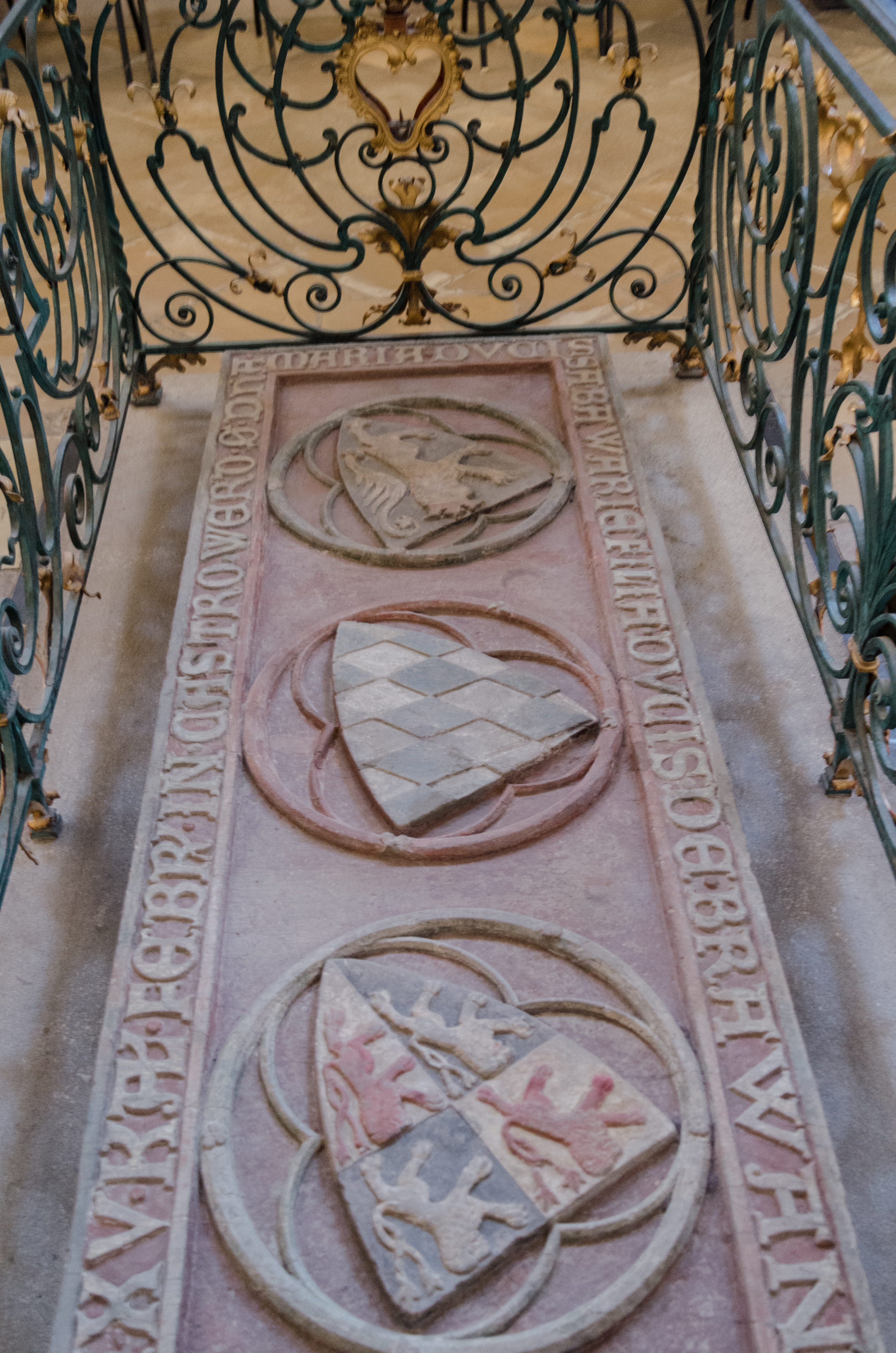 Katholische Wallfahrtskirche Donauwörth